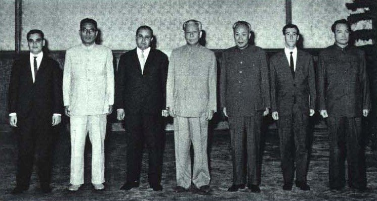 1964-10 1964年8月2日 阿尔及利亚驻华大使穆罕默德·亚拉（左三）向刘少奇递交国书后合影